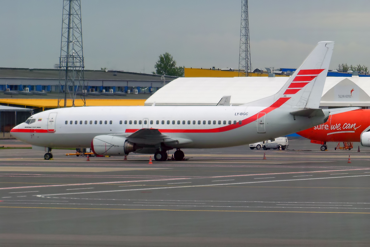 Aurela, LY-BGC, Boeing 737-35B